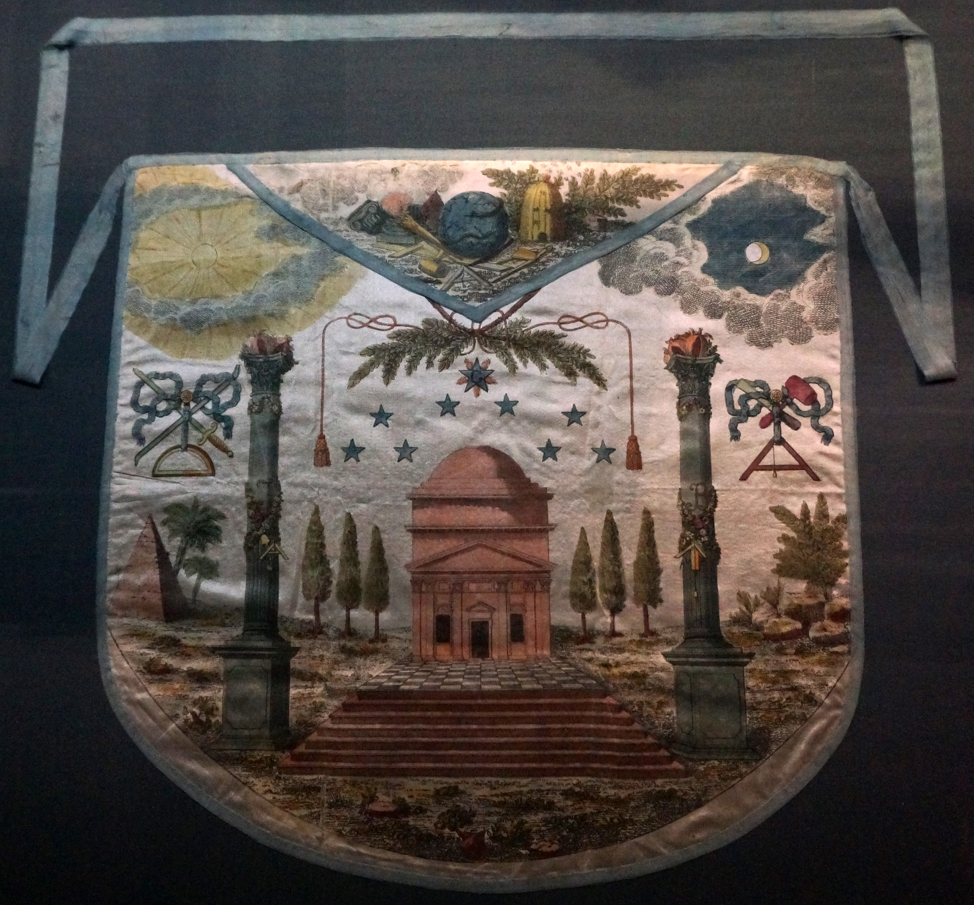 présenté au Musée de la Franc-Maçonnerie.